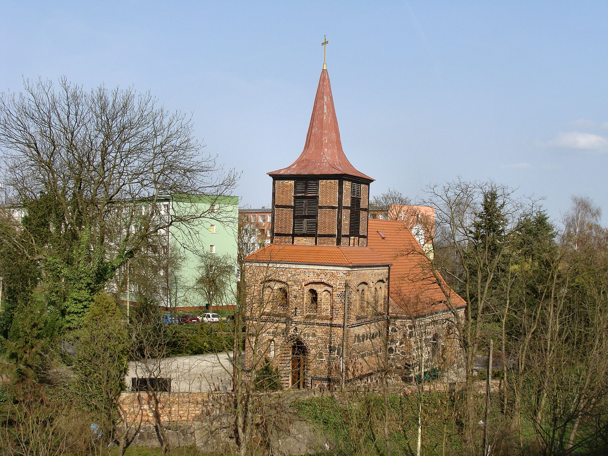 Kościół św. Maksymiliana Marii Kolbego w Szczecinie (Pomorzany)